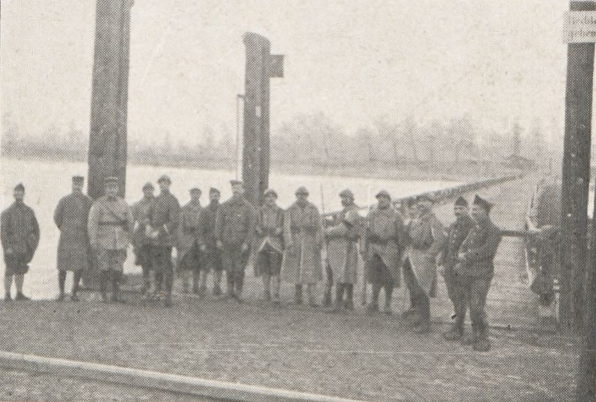 La garde au Rhin. (Germersheim, décembre 1919.) Historique du 18e bataillon de chasseurs à pied